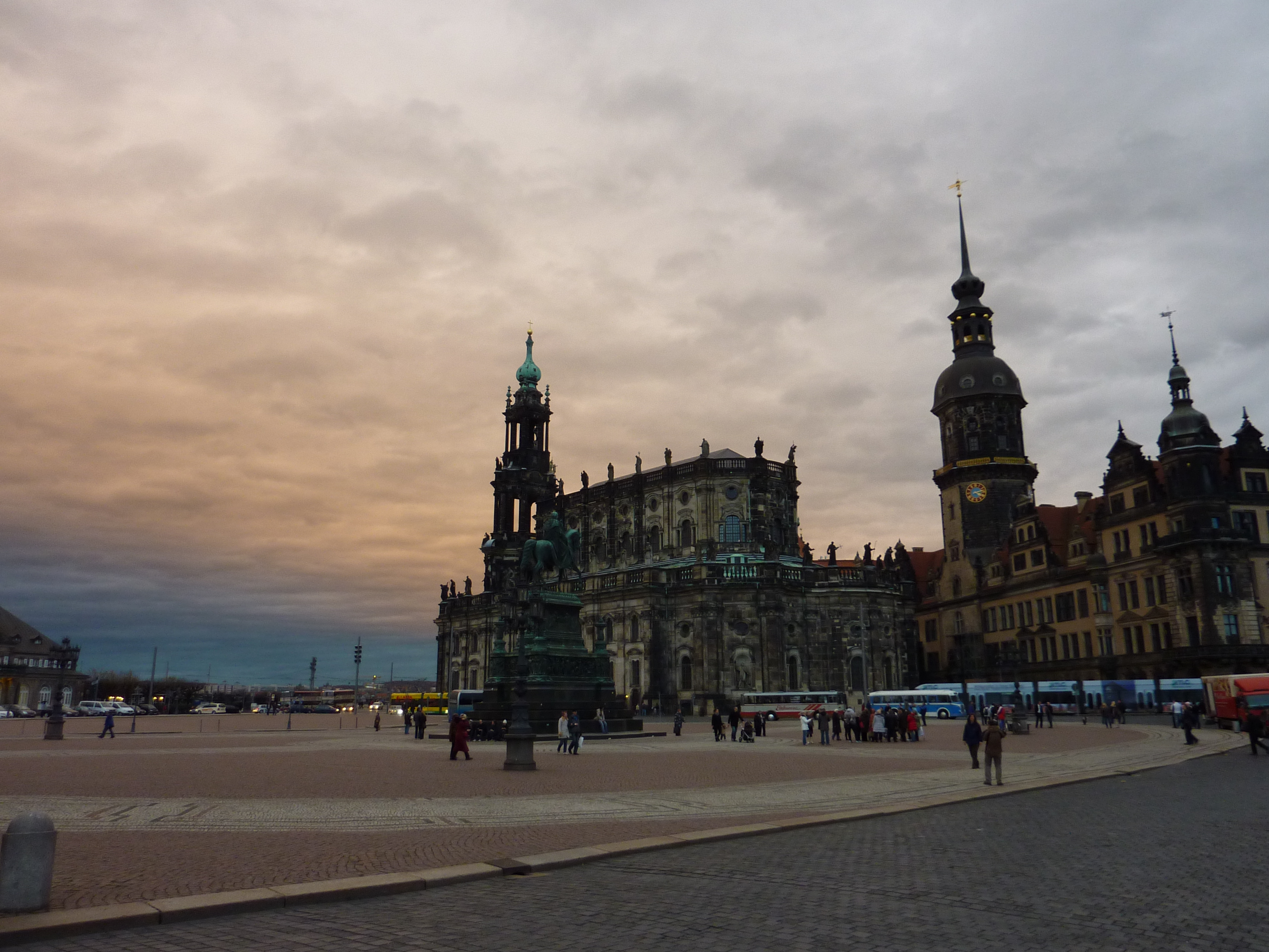 Theaterplatz, Dresden